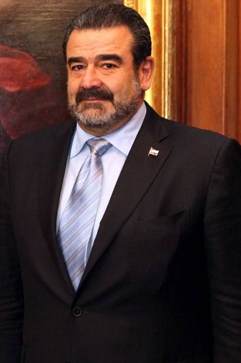 Andrónico Luksic Craig, empresario chileno, en 2010.